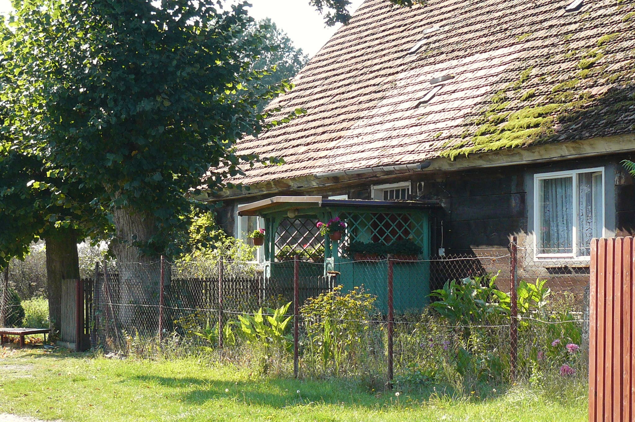 Sękowo - najstarsza wieś olęderska na ziemi nowotomyskiej.